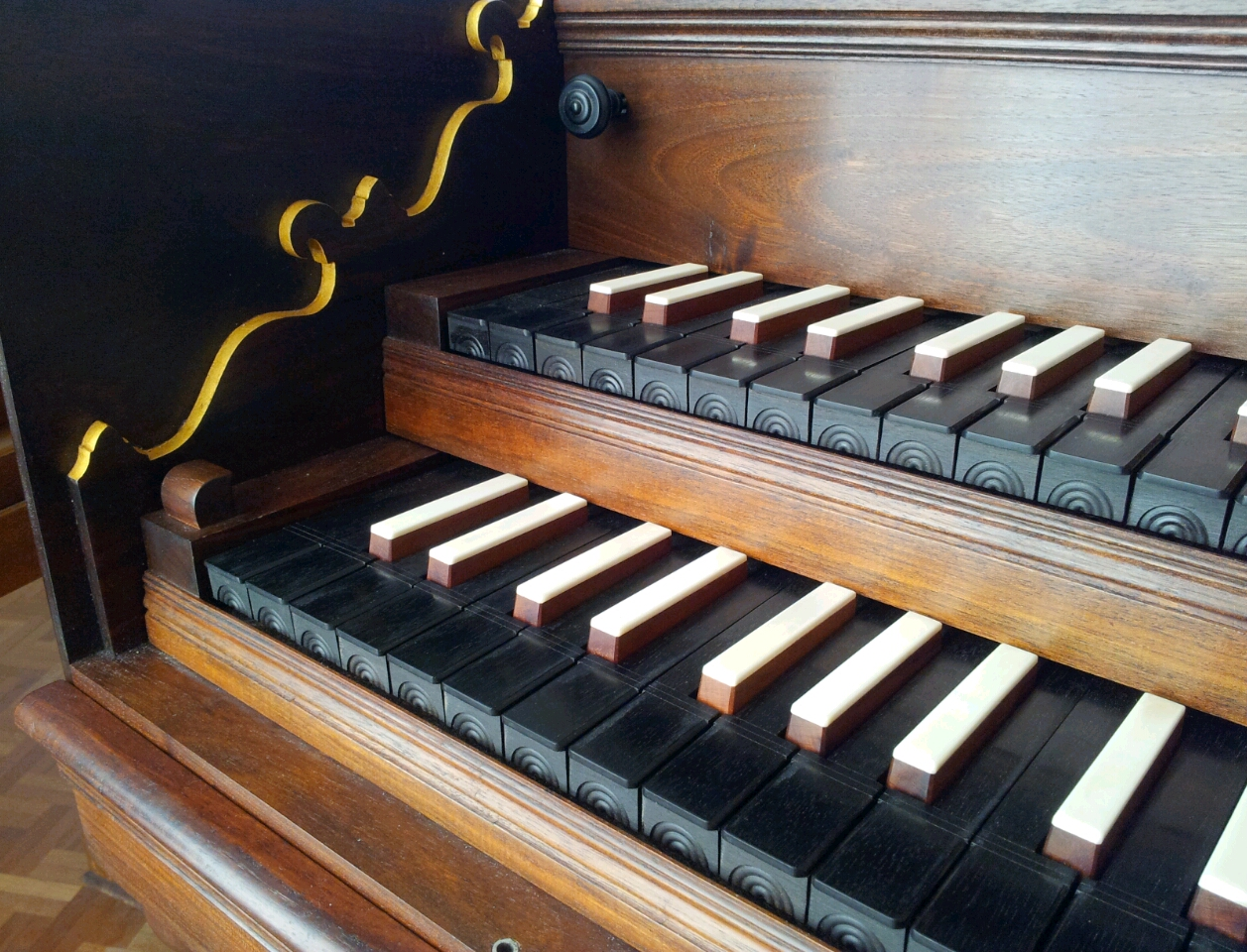 Harpsichord, made by Guillaume Rebinguet-Sudre